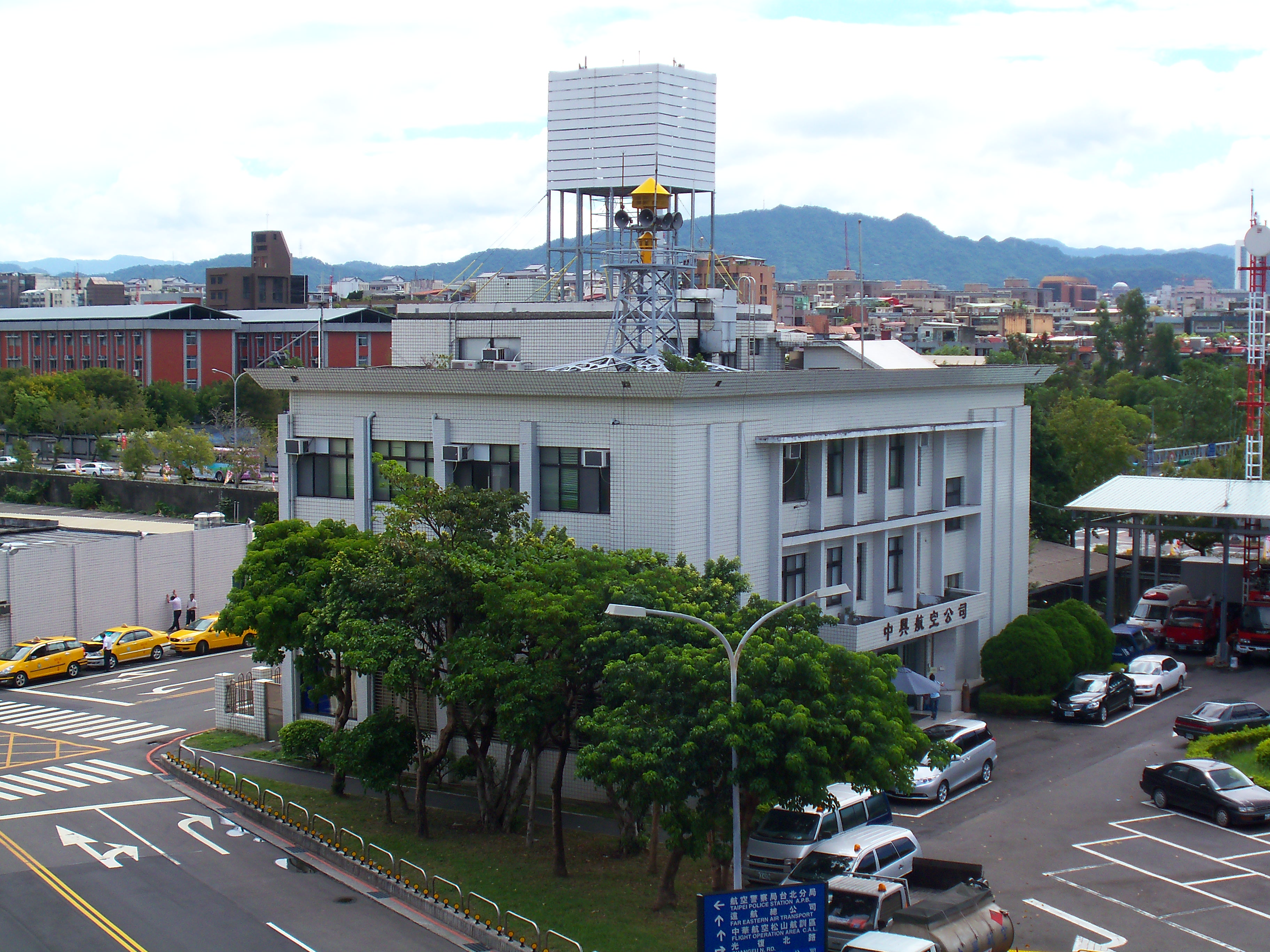 從松山機場第三號停車場屋頂東南俯望中興航空公司，地址：臺北市松山區敦化北路340號之2。